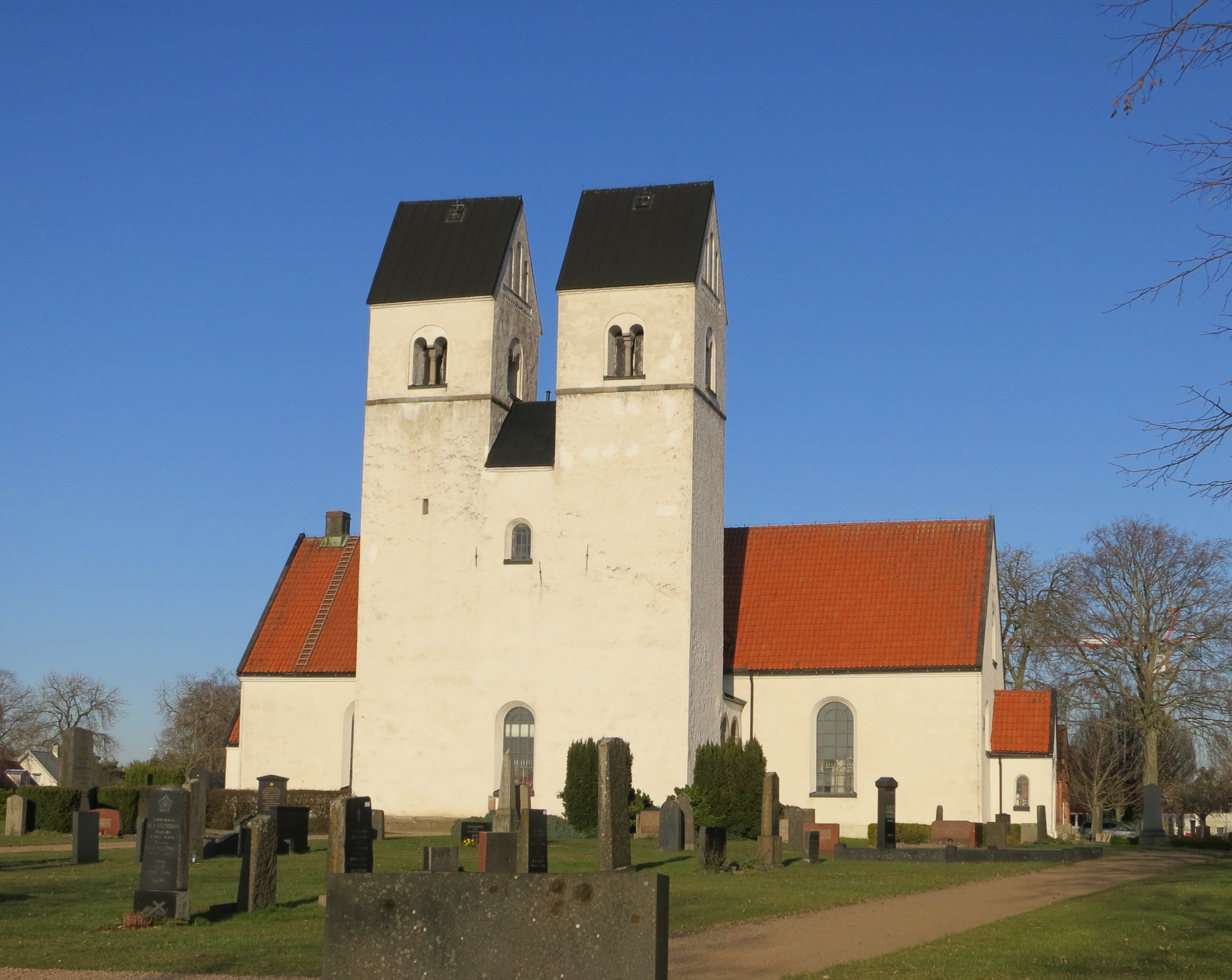 Färlövs kyrka, mars 2014